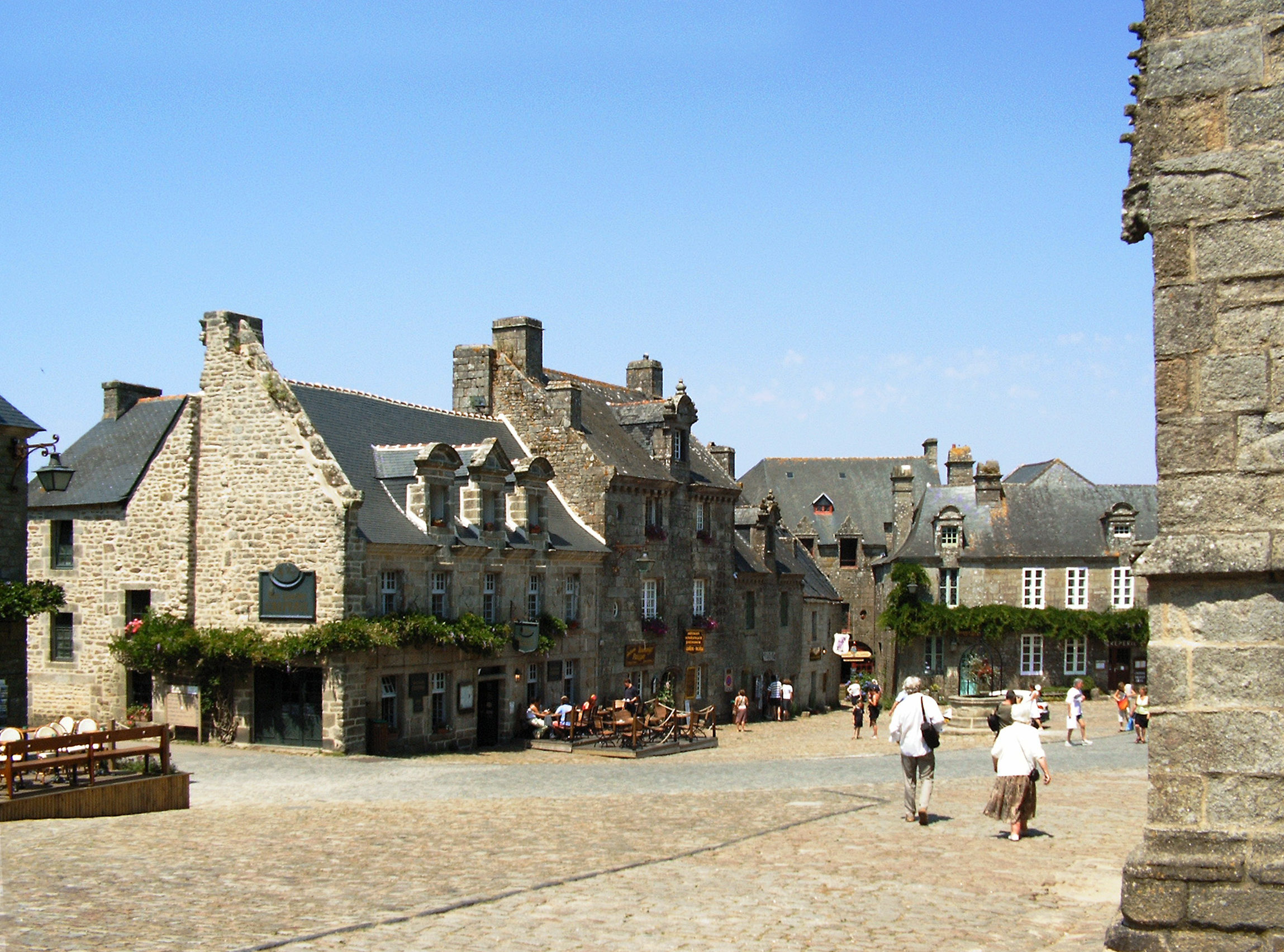 Häuser am Kirchplatz /Marktplatz in Locronan